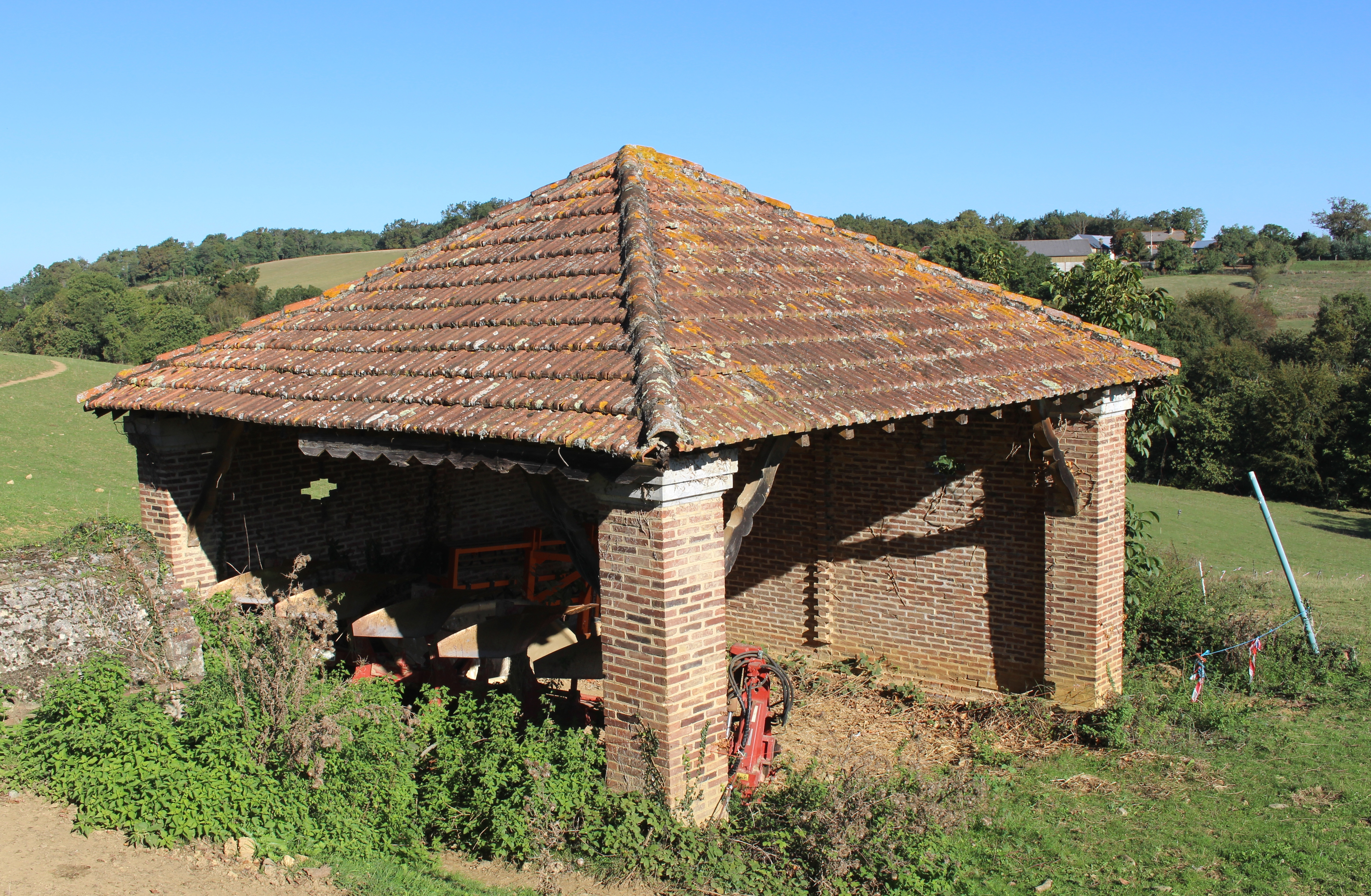 Lavoir de Marquerie (Hautes-Pyrénées)